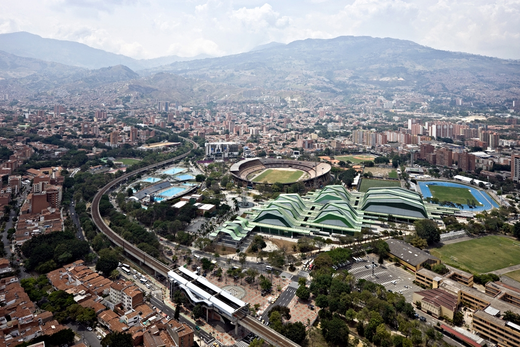 Estación Estadio (Metro de Medellín)